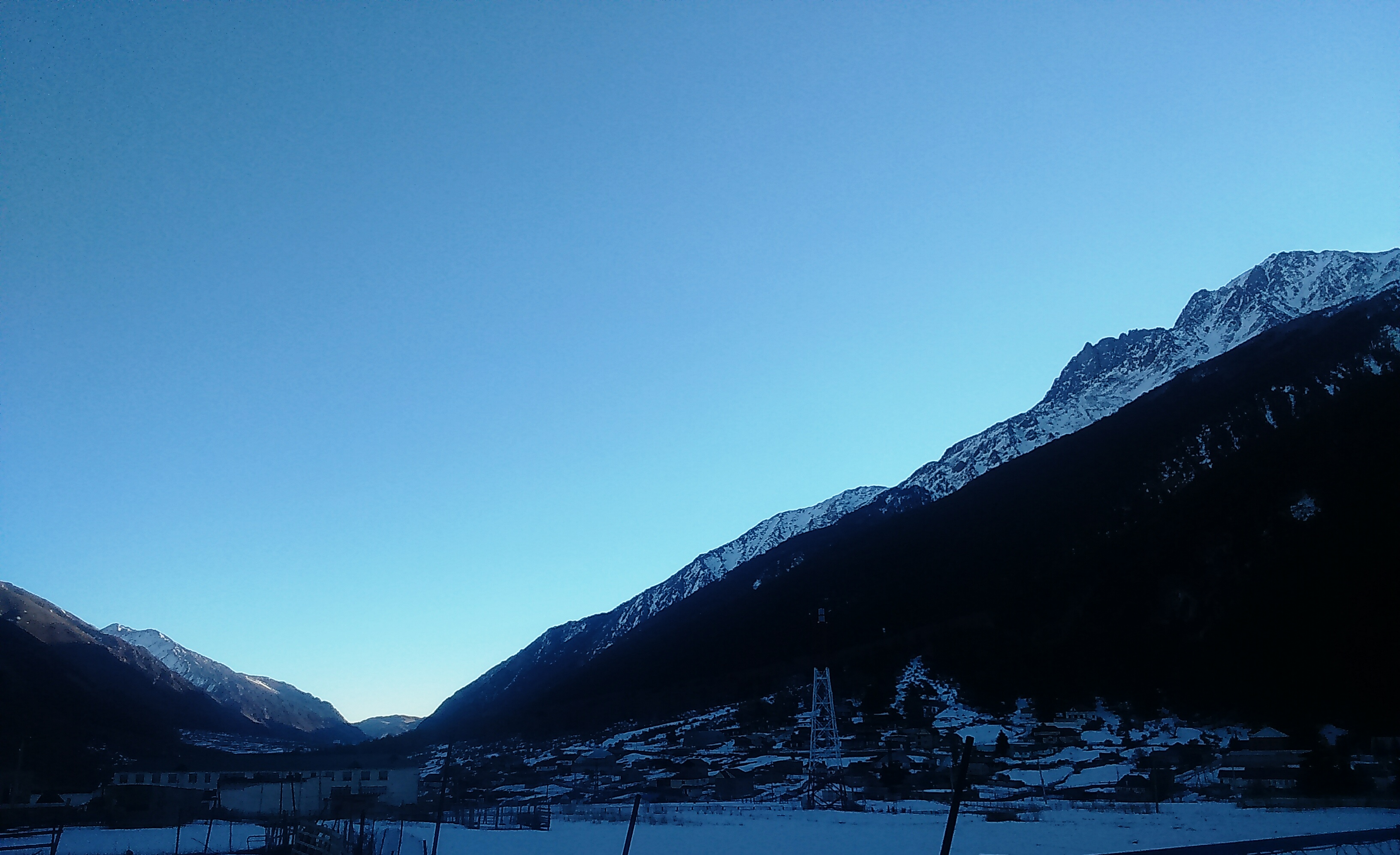 Правобережная часть села Эльбрус